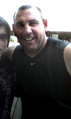 Fabio "La Mole" Moli, 2008 en las calles de Córdoba Capital.